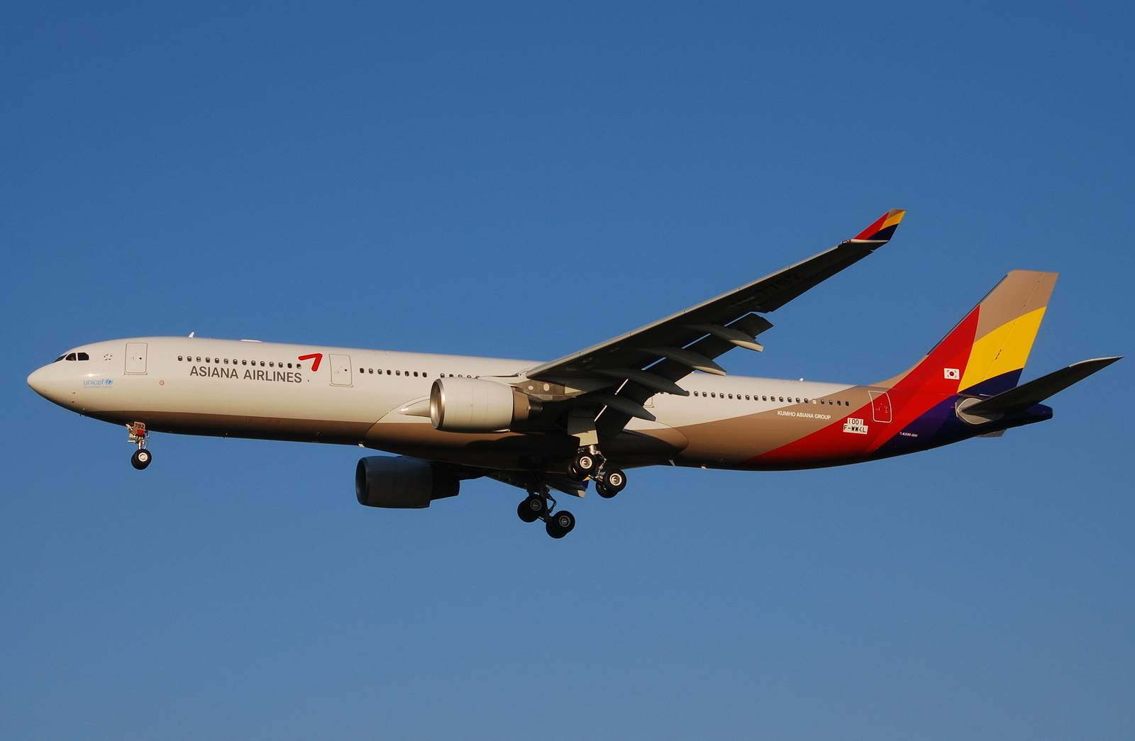 Photo prise à l'aéroport de Toulouse-Blagnac (LFBO) en France. Picture take at Toulouse-Blagnac Airport (LFBO) in France.